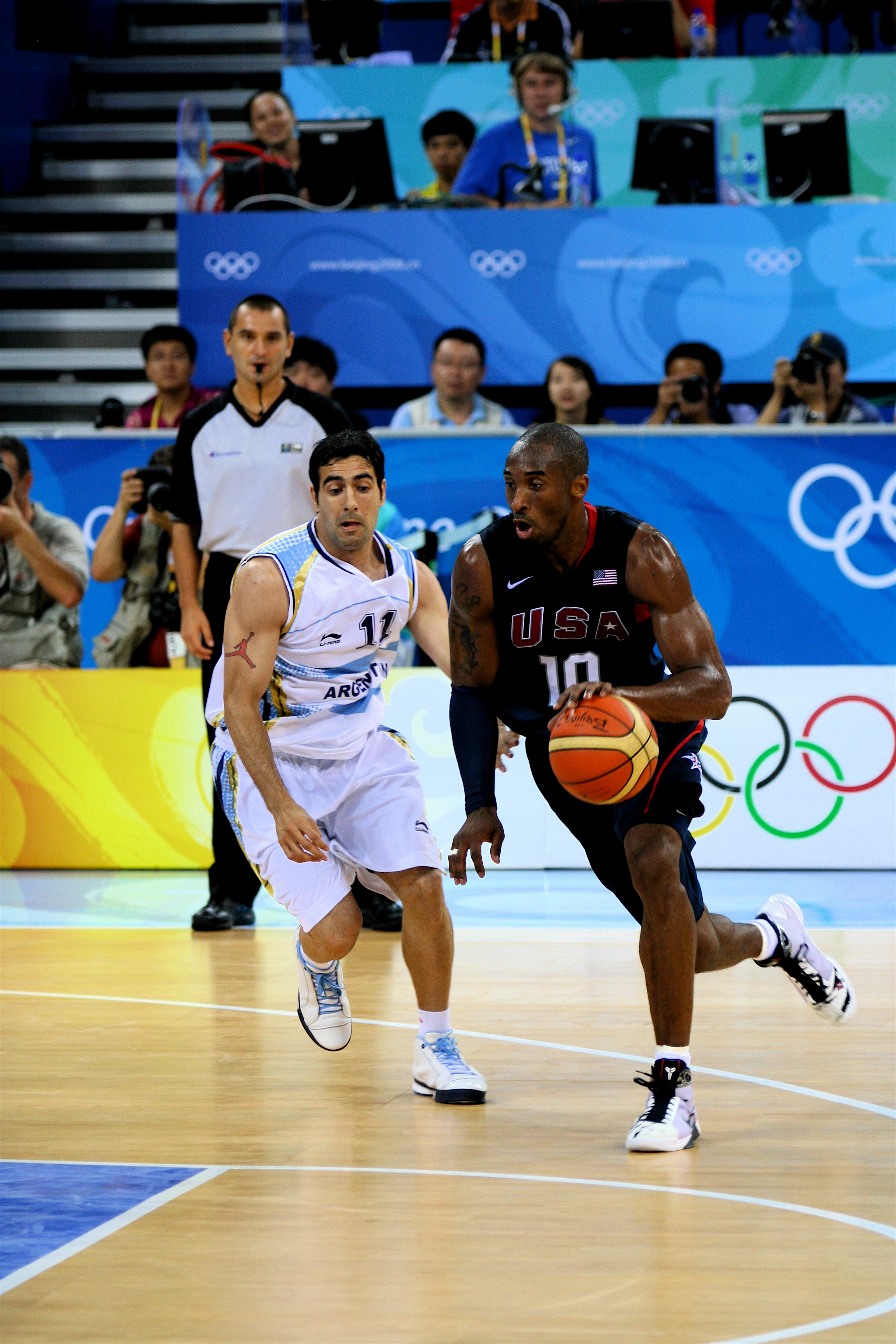 Kobe Bryant en semifinales de los J.J.O.O. Beijing 2008.